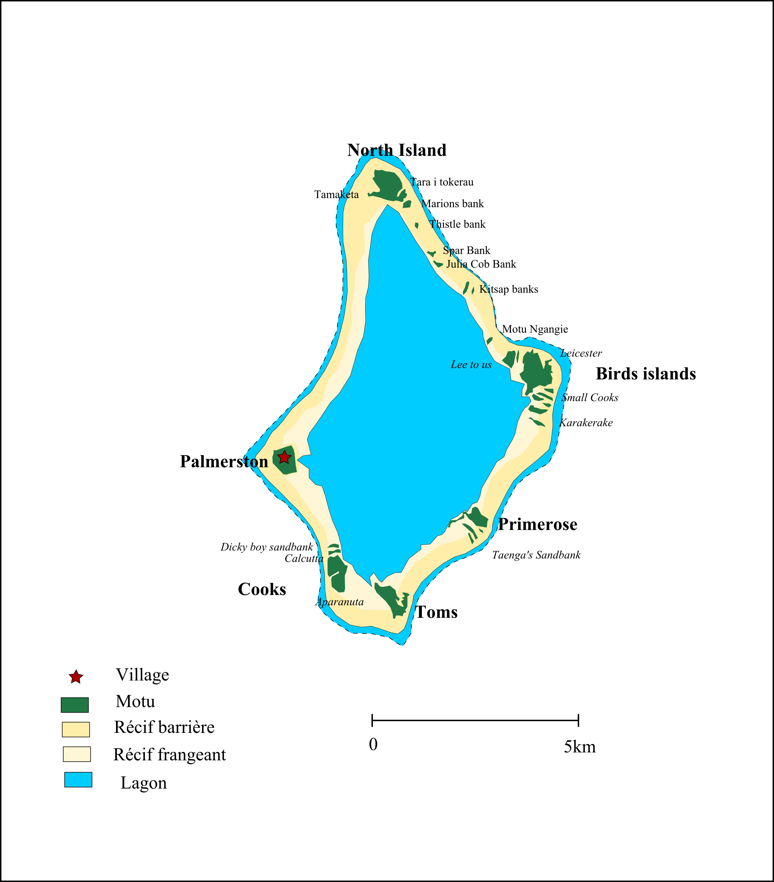 Carte de Palmerston (îles Cook) - Palmerston island Map (Cook Islands